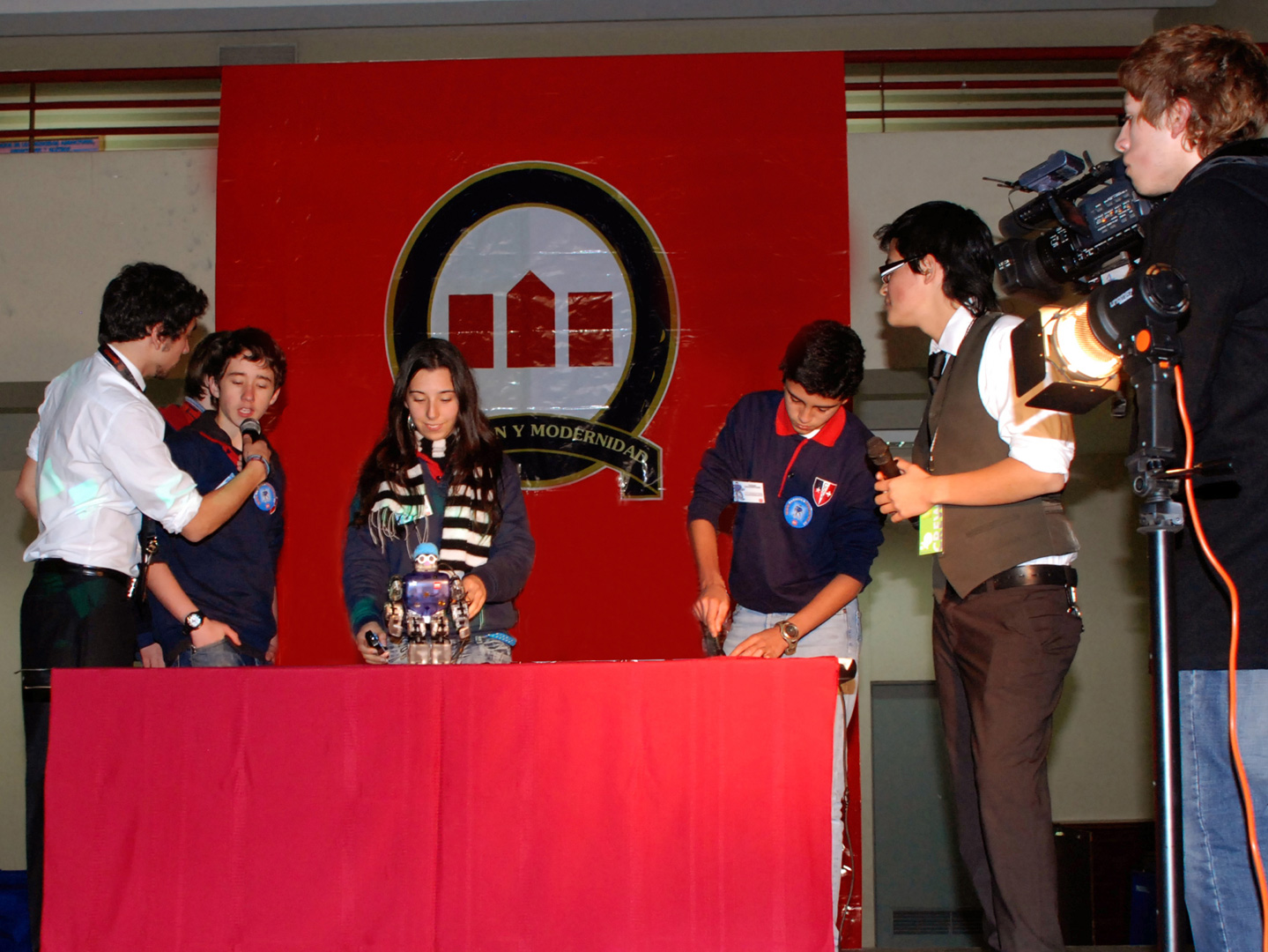 Primer Campeonato con Robots Humanoides en Chile, Campeonato de Baile Robótico CIETE-UNAB 2010